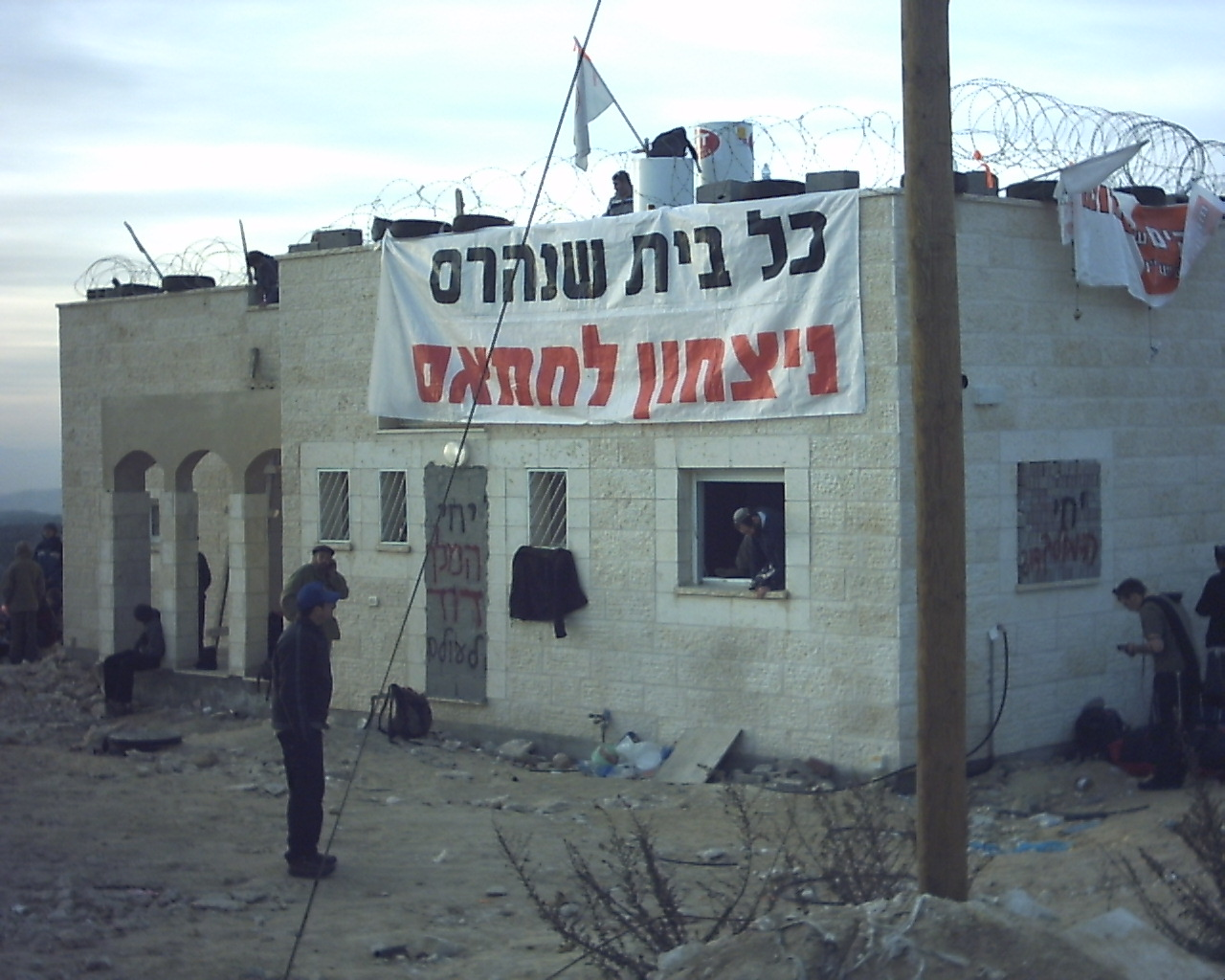 תמונת אחד הבתים שנהרסו בעמונה, שעות לפני העימות.